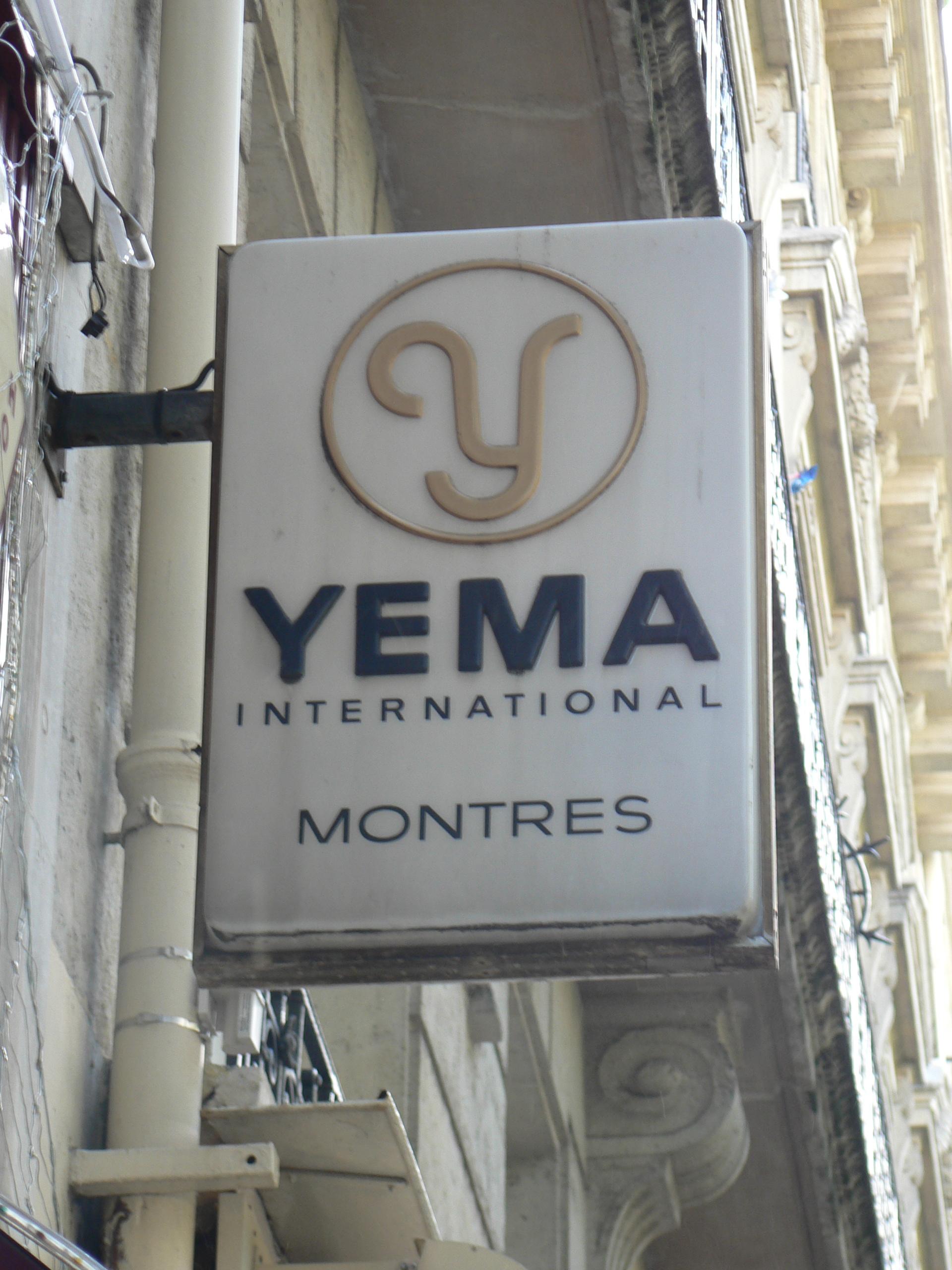 Boutique de Montres située à Paris XII